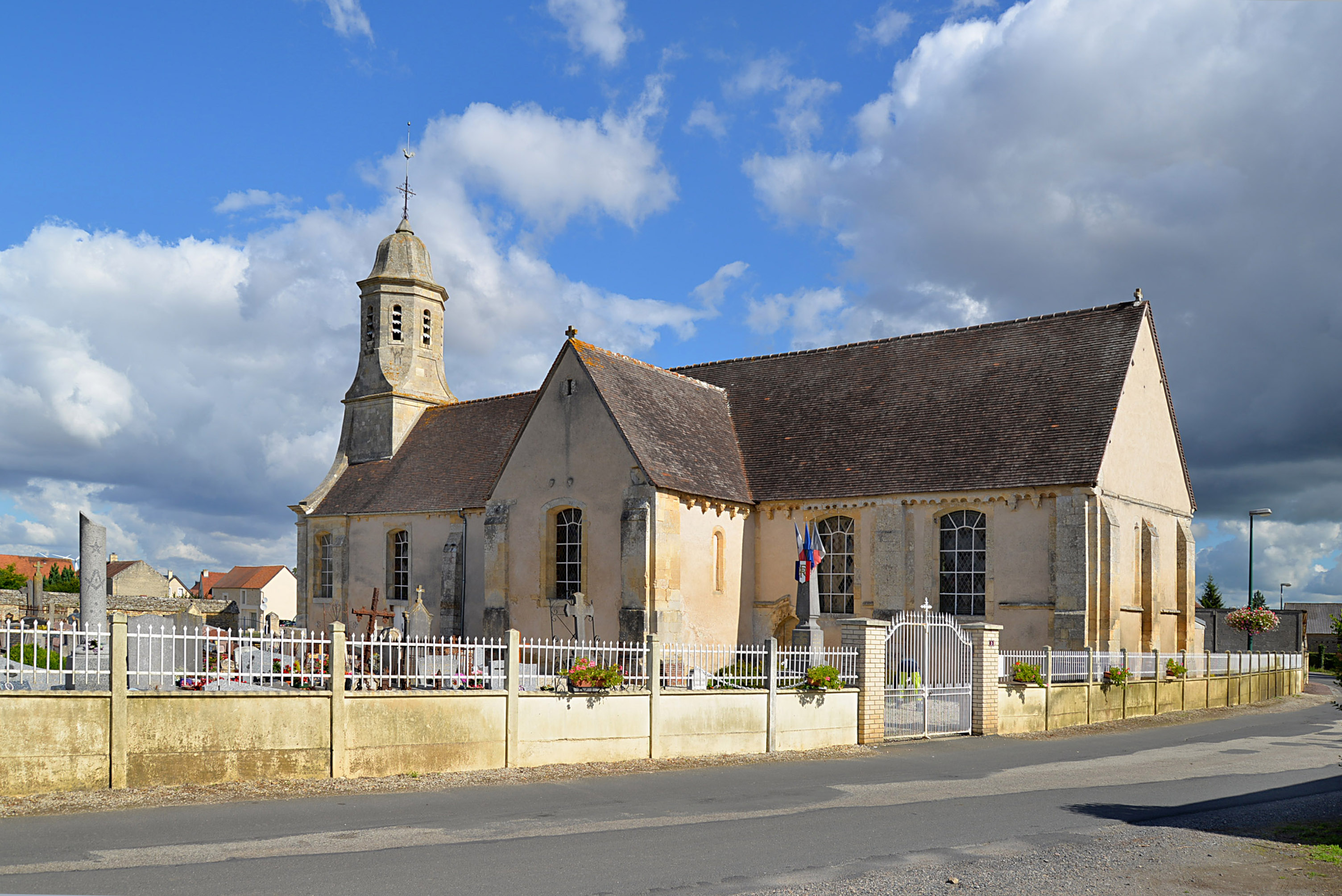 Vieux-Fumé (Calvados)